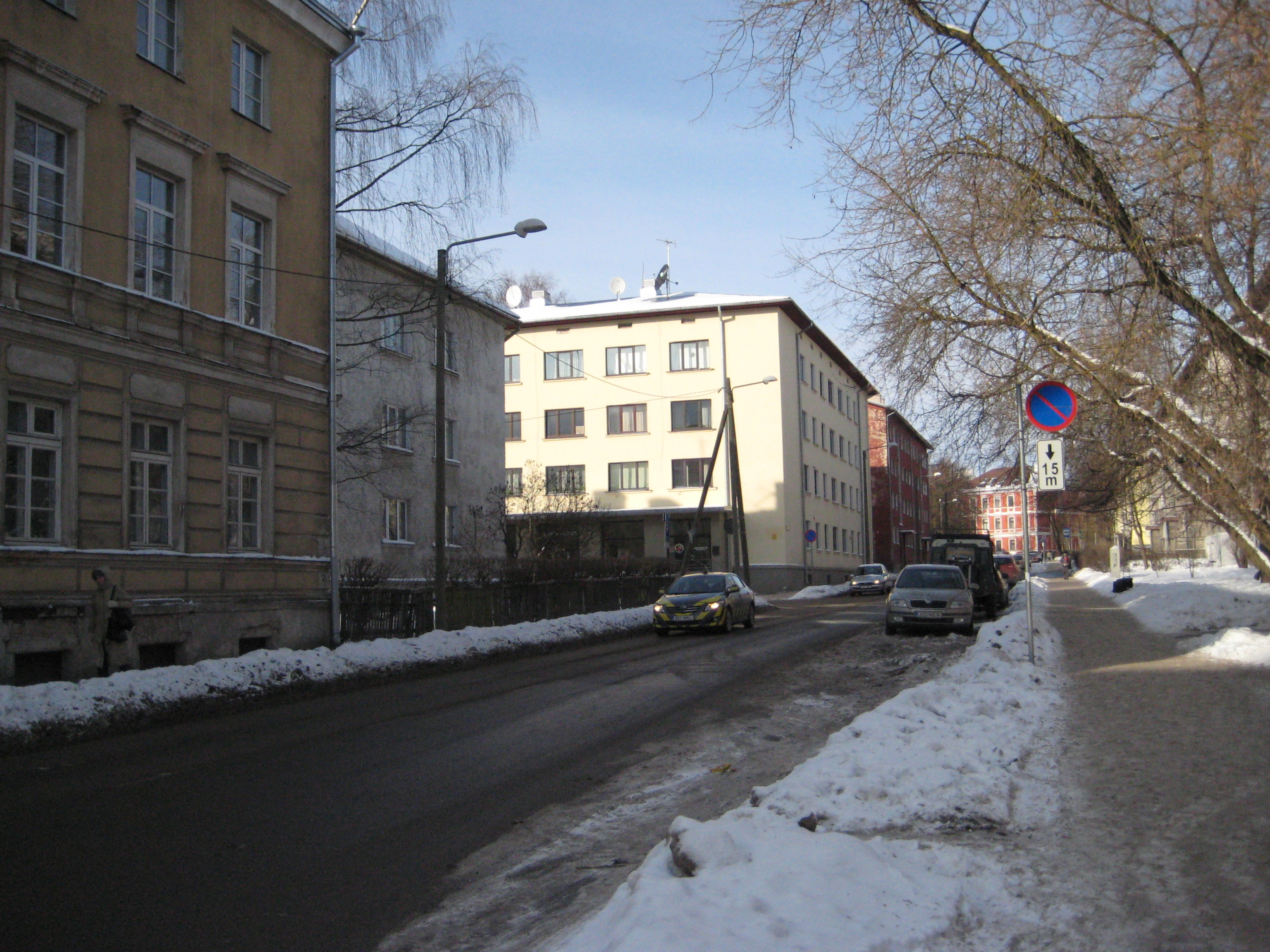 Pepleri tänav Vanemuise ristmikult Kuperjanovi tänava poole, Tartu